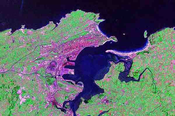 Imágen espectral de la Bahía de Santander (Cantabria) tomada por el satélite Lansat.